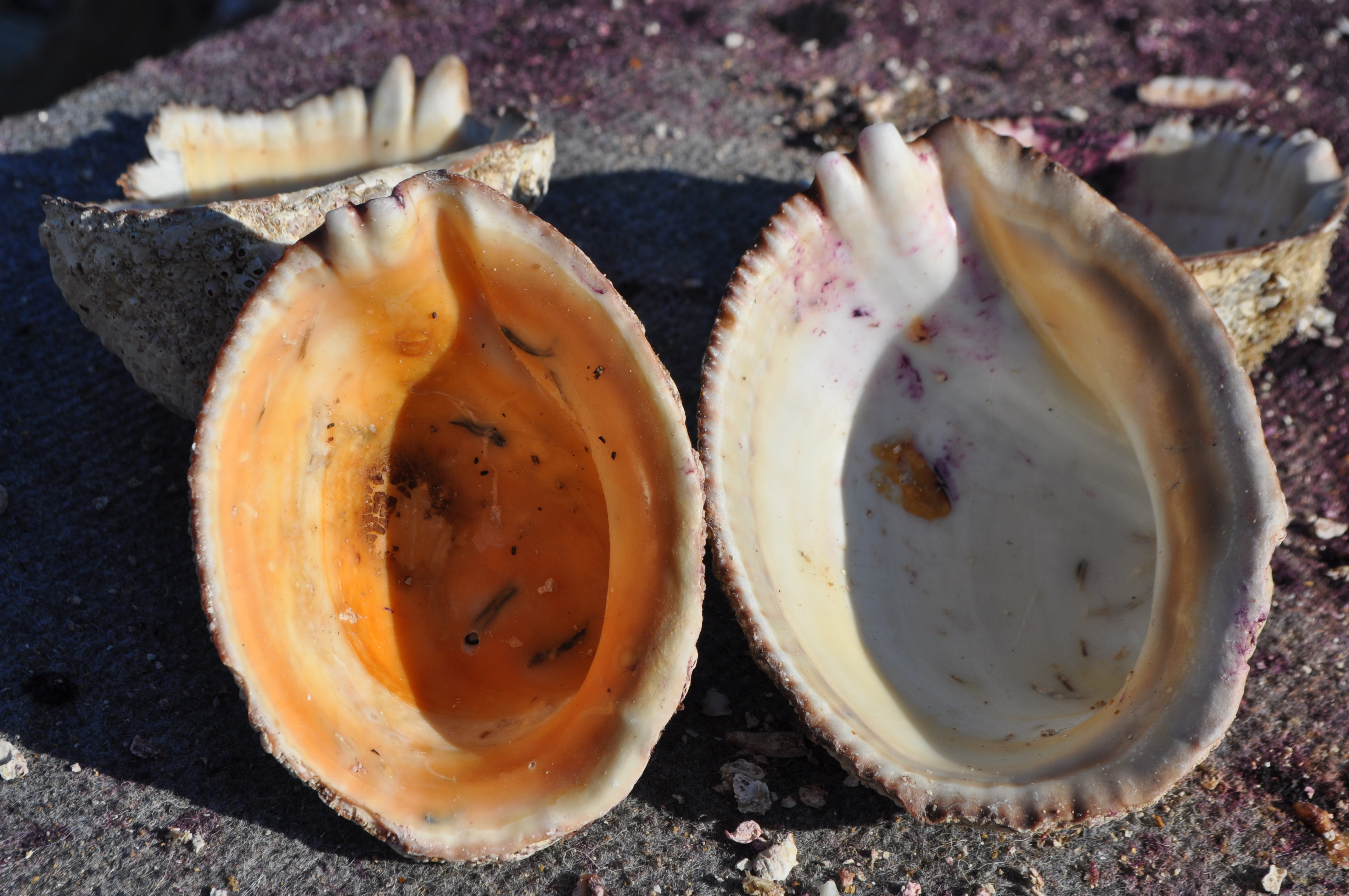 Distinta coloración de la superficie cóncava de la concha.